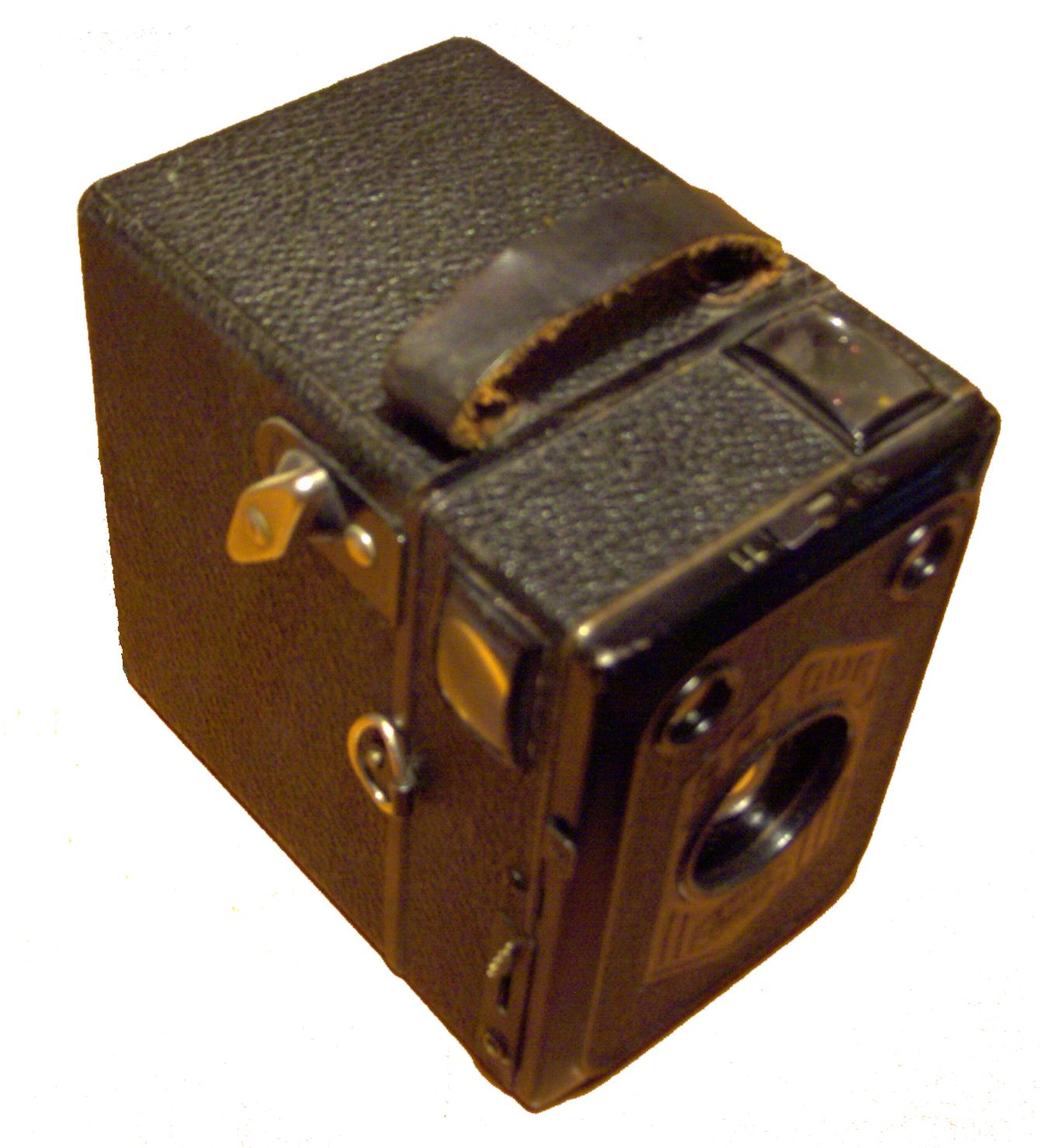 Selbst aufgenommen, gemeinfrei